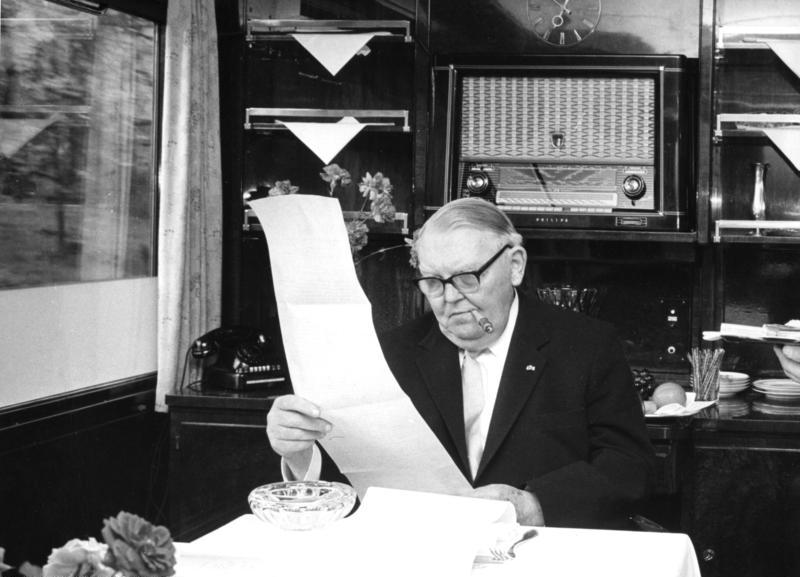 Bundeskanzler Prof. Ludwig Erhard bevorzugt auf seinen Dienstreisen durch die Bundesrepublik Deutschland die Bundeseisenbahn. Einige Sonderwagen sind mit allen Mitteln der Technik ausgerüstet, damit der Bundeskanzler ständig in Verbindung mit der Regierungszentrale in Bonn sein kann. Im Bild: Bundeskanzler Prof. Erhard im Arbeitsraum seines Sonderwagens beim Studium der neuesten Nachrichteneingänge.